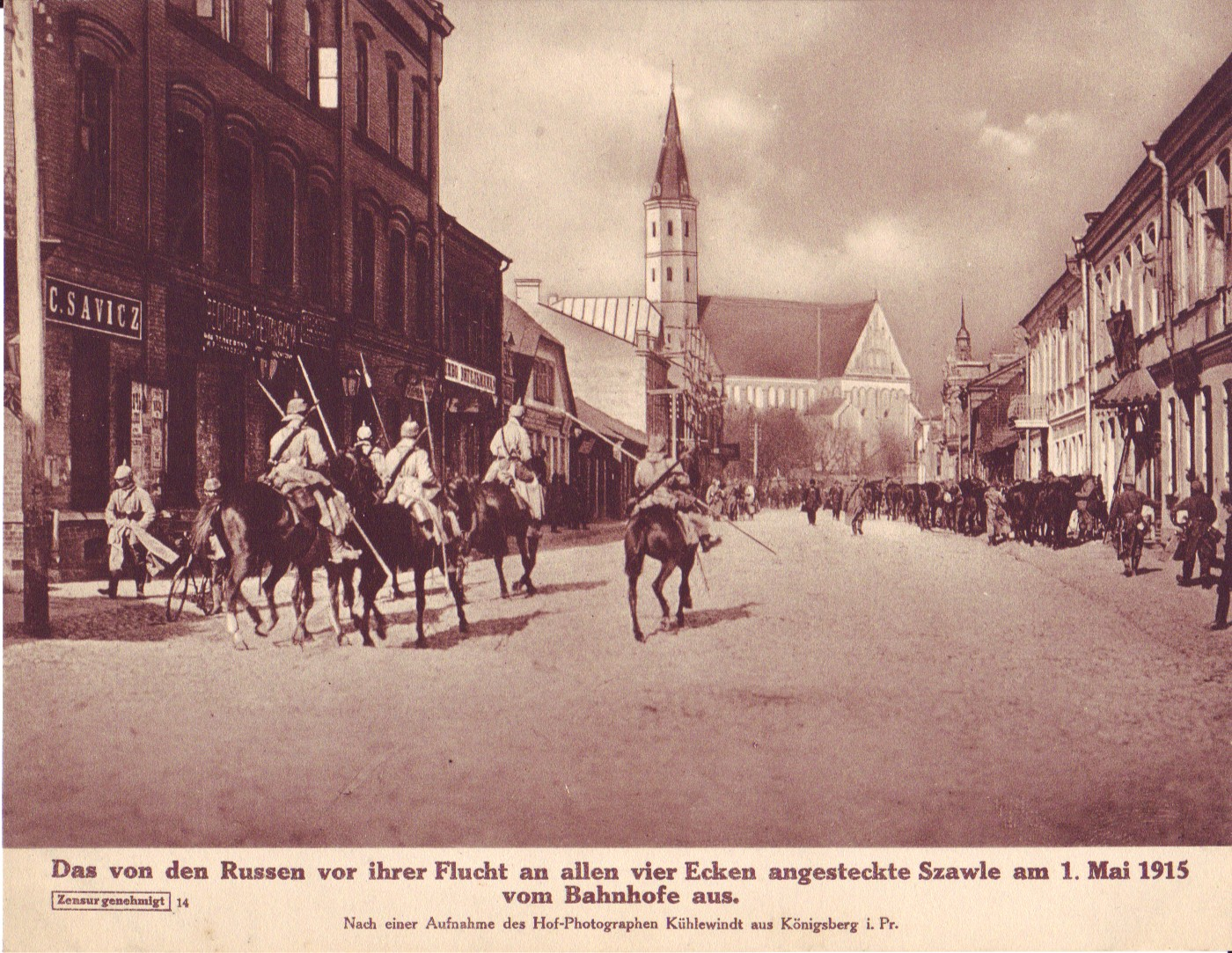 Postkarte